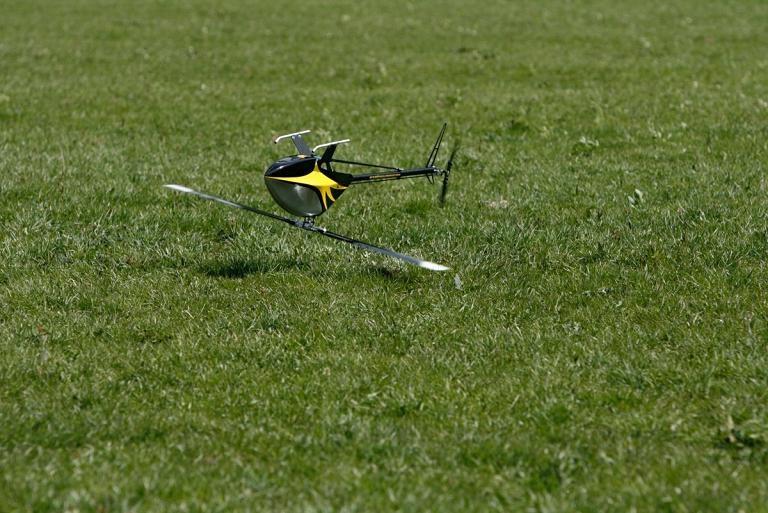 Rückenflug eines Modellhelikopters; Pilot: Curtis Youngbood